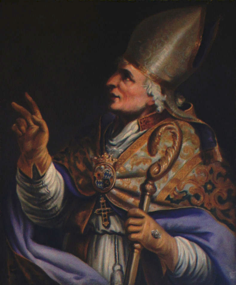 Porträtgemälde von Heinrich II. von der Pfalz, Fürstbischof von Freising, im Fürstengang zwischen Fürstbischöflicher Residenz und Freisinger Dom.